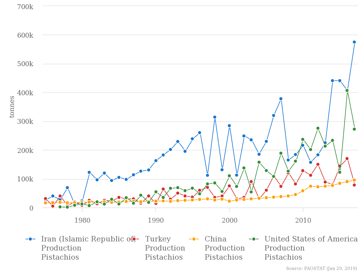 چارت پسته